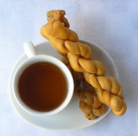 神奈川県で製造の麻花（プレーン、ゴマ）